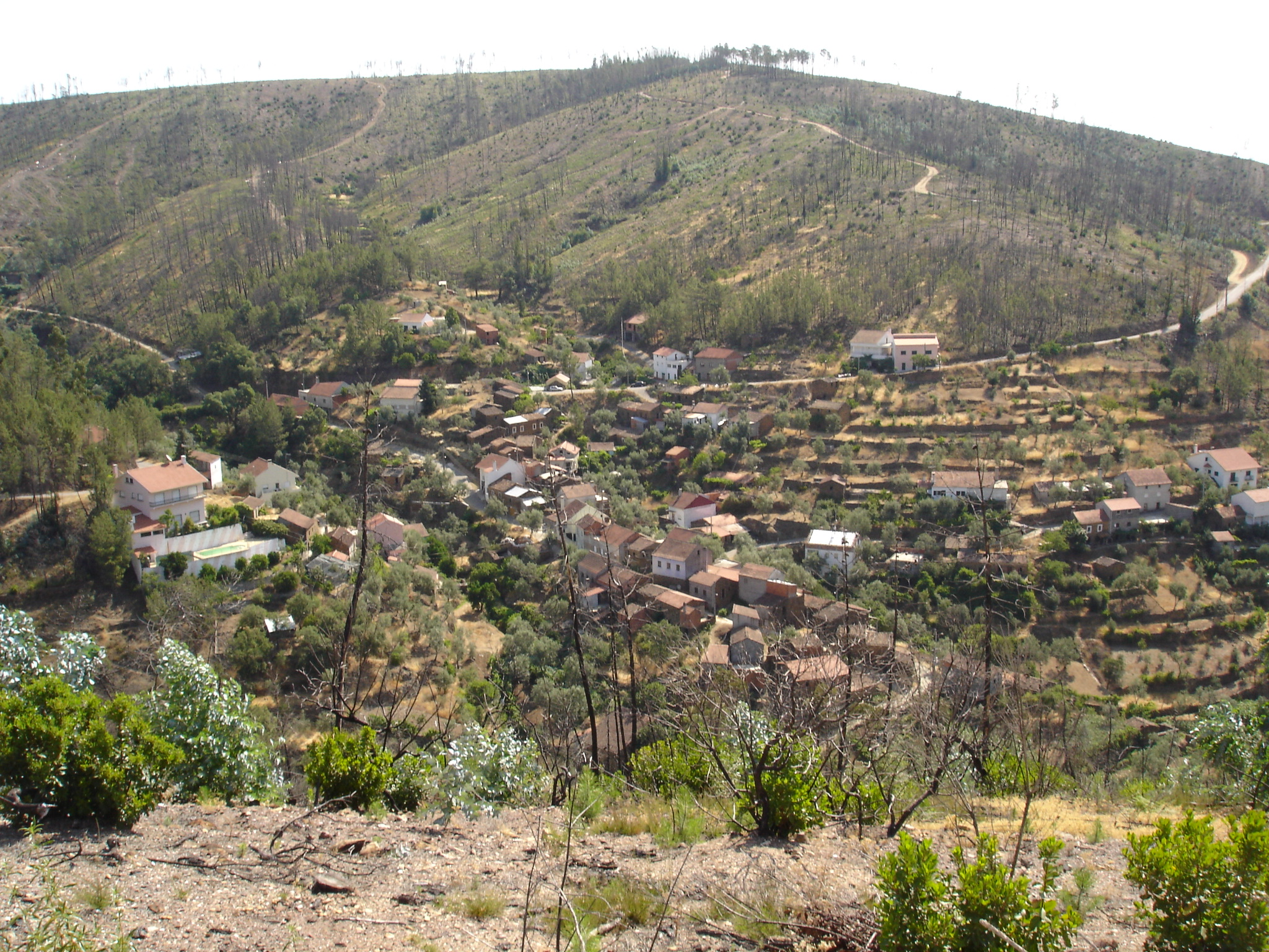 Vista geral da aldeia do Esfrega